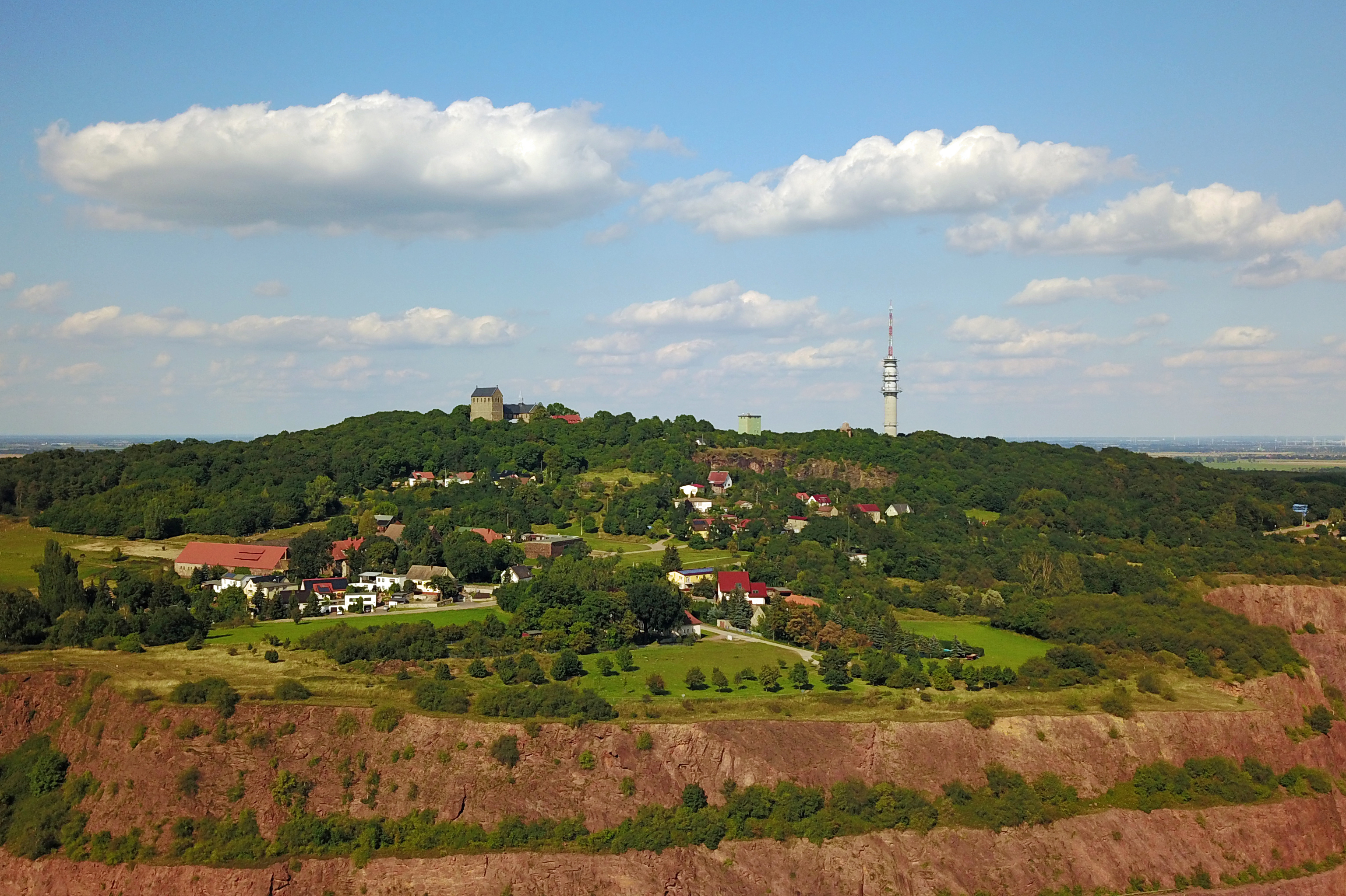 Petersberg bei Halle (Luftaufnahme 100 m über Gelände nördlich Frößnitz zwischen Köthener Landstraße und Steinbruch; Blick Richtung Nordosten; im Vordergrund der Bruch der Mitteldeutsche Baustoffe GmbH Petersberger Quarzporphyr)